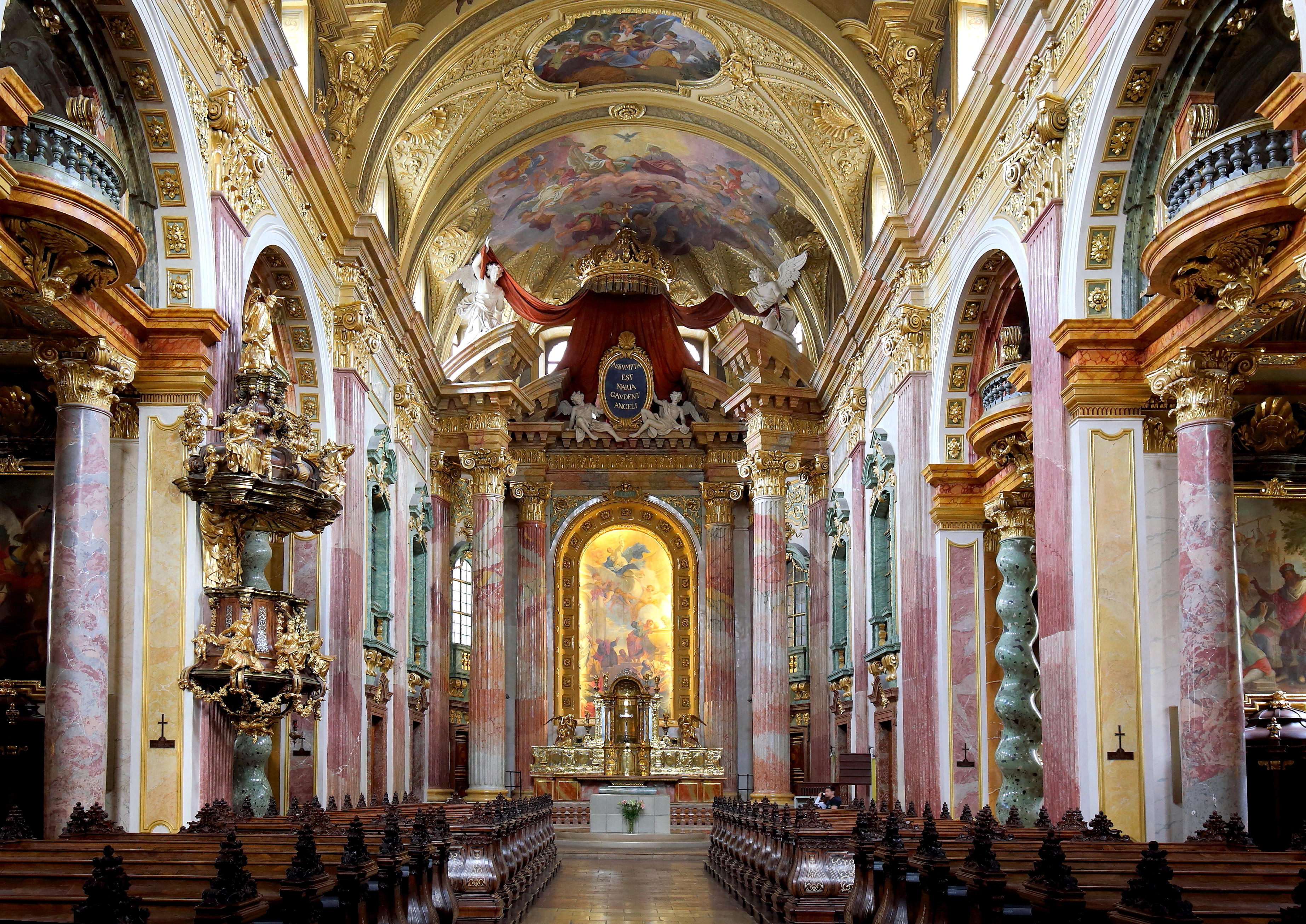 Innenansicht der Jesuitenkirche, auch Universitätskirche bezeichnet, im 1. Wiener Gemeindebezirk Innere Stadt.Die Kirche wurde von 1623 bis 1627 von einem unbekannten Architekten errichtet. Von 1703 bis 1707 wurde der Kirchenbau von dem Jesuiten, Maler und Architekten Andrea Pozzo wesentlich umgebaut und umgestaltet. Unter anderem errichtete er die Türme. Über den acht Seitenkapellen zog er Emporen ein, die miteinander verbunden sind und von geraden und geschwungenen Säulen getragen werden. Er gestaltete auch die Fresken und schuf das Hochaltarbild sowie bis auf eines alle Seitenaltarbilder. Die Deckenfresken wurden 1827 und 1899 überarbeitet.